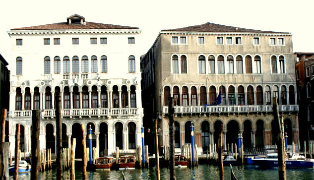 Palazzi Loredan e Farsetti sul Canal Grande, Venezia